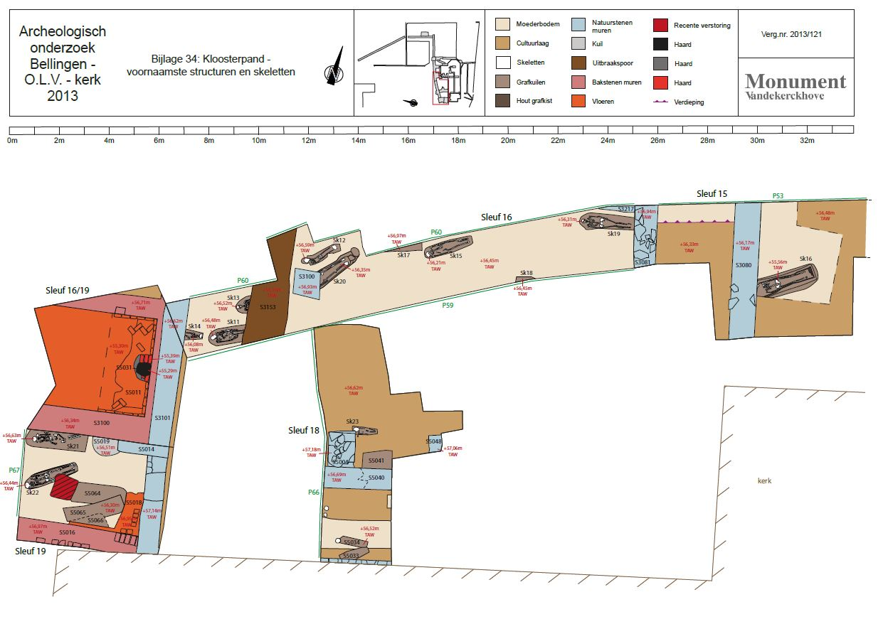 abdij van Cantimpré (Cantimpret) van Bellingen: Kloosterpand voornaamste skeletten en structuren